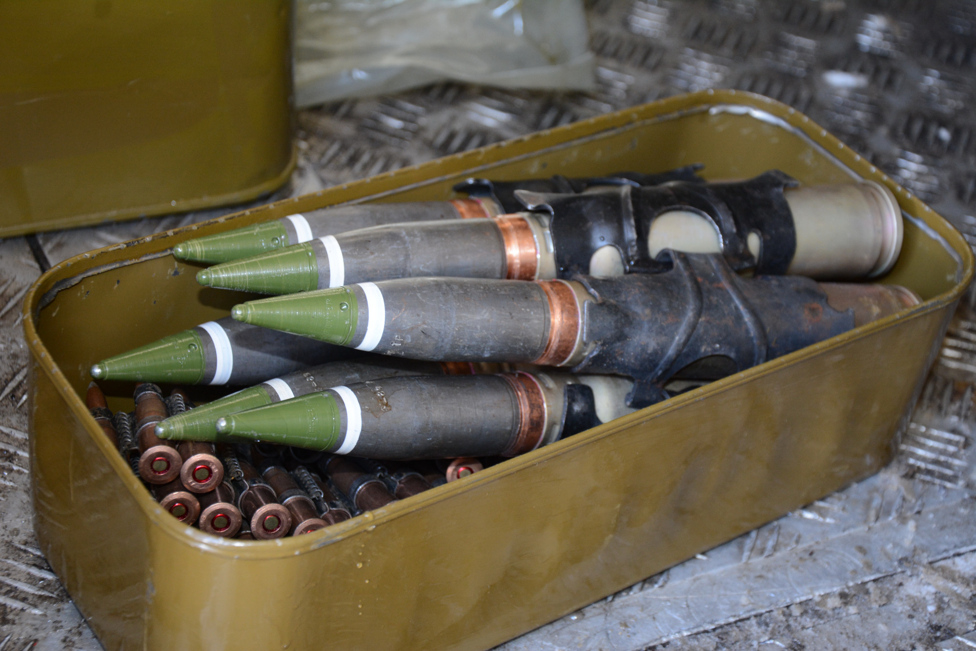 UP Übungsmunition